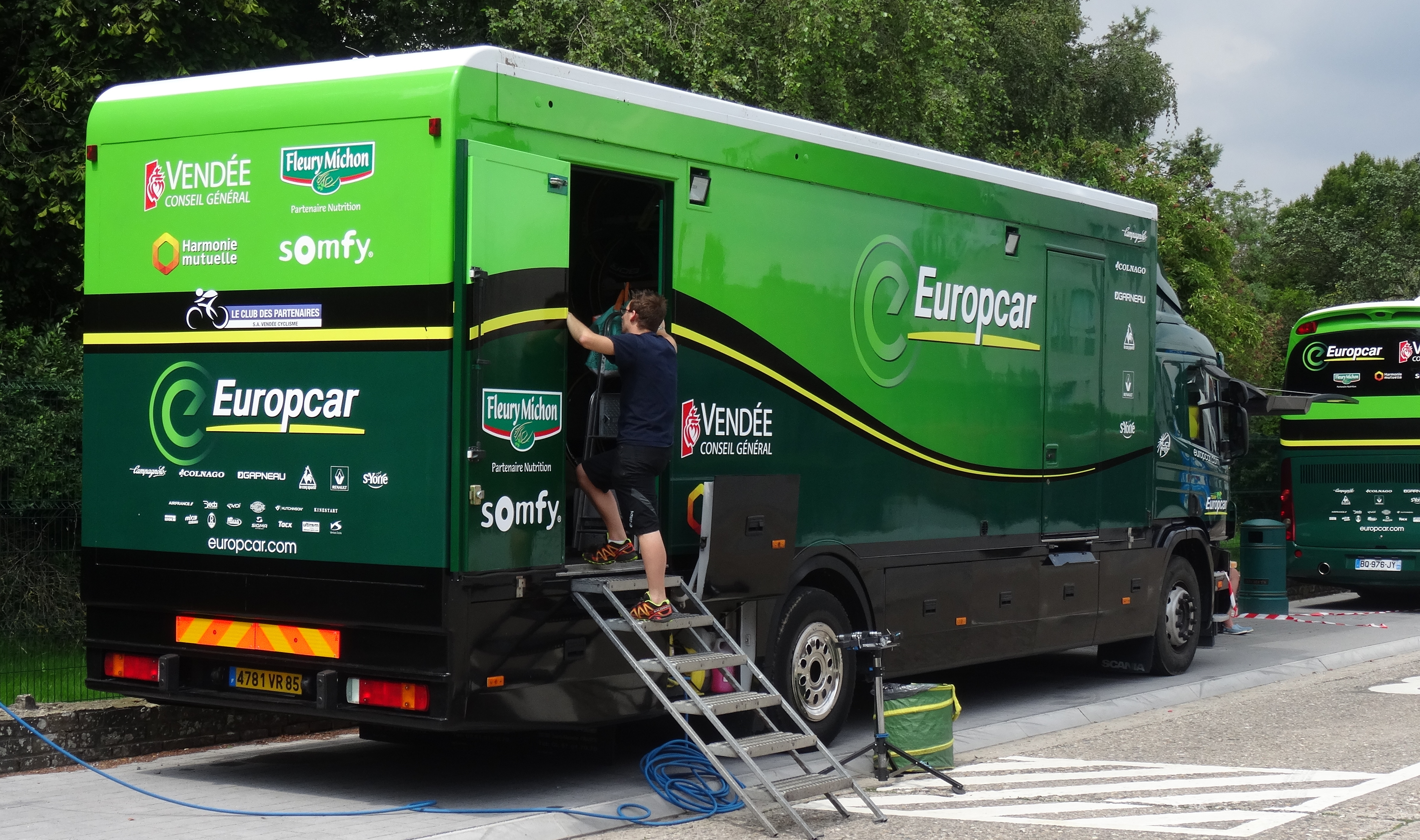 Reportage photographique réalisé le mercredi 30 juillet à l'occasion de l'arrivée de la cinquième et dernière étape du Tour de Wallonie 2014 à Alleur (Ans), Belgique.